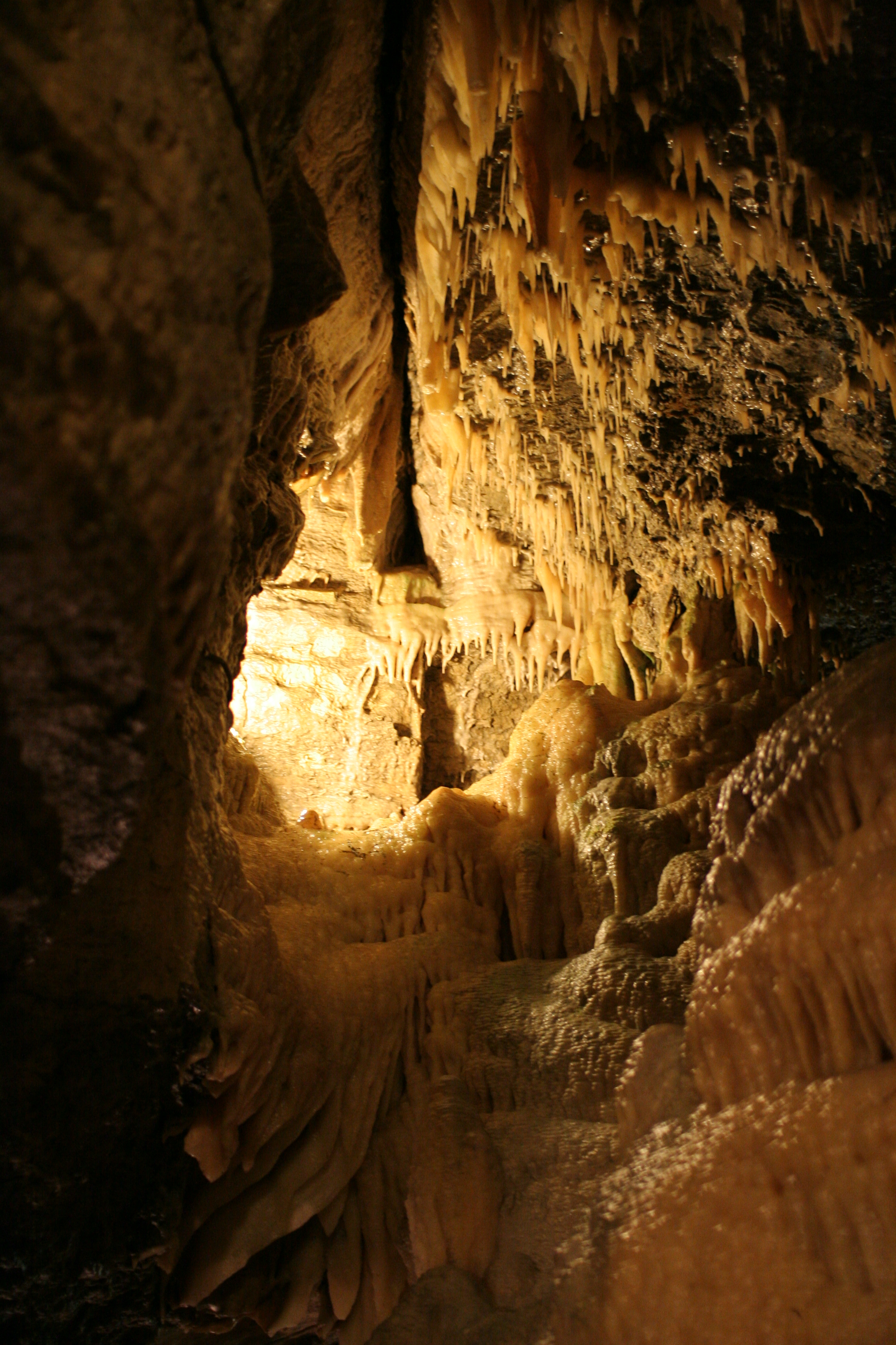 Eberstadter Tropfsteinhöhlen Juni 2006.